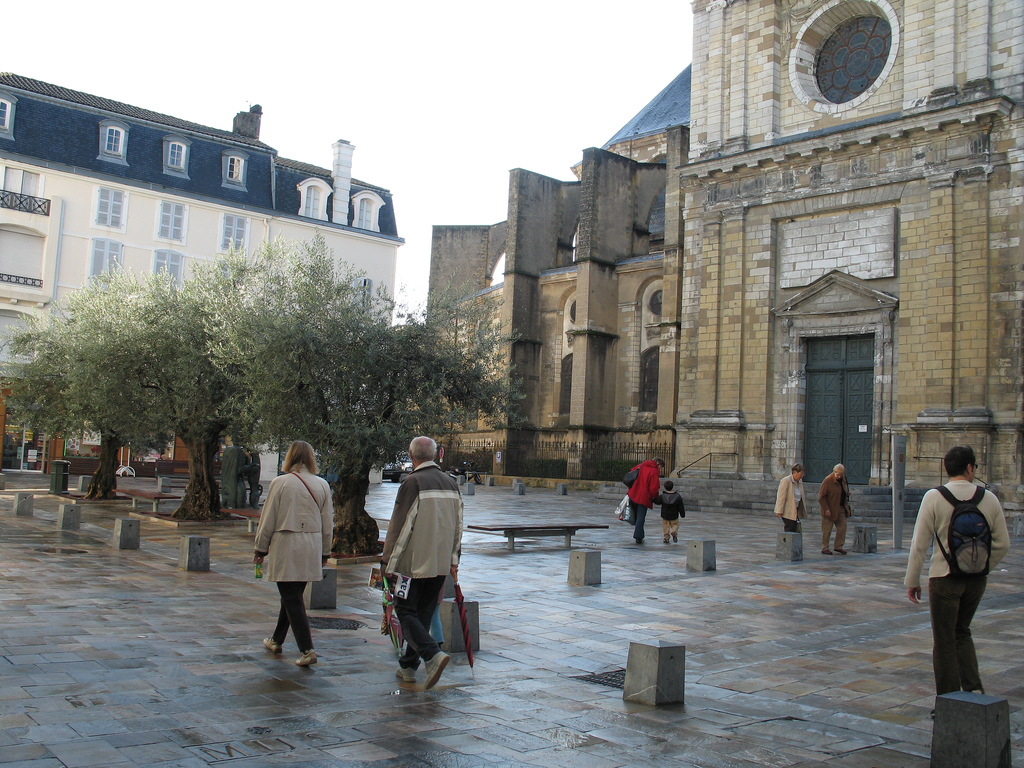 La Fontaine Chaude, Dax, Landes, Gascogne, France